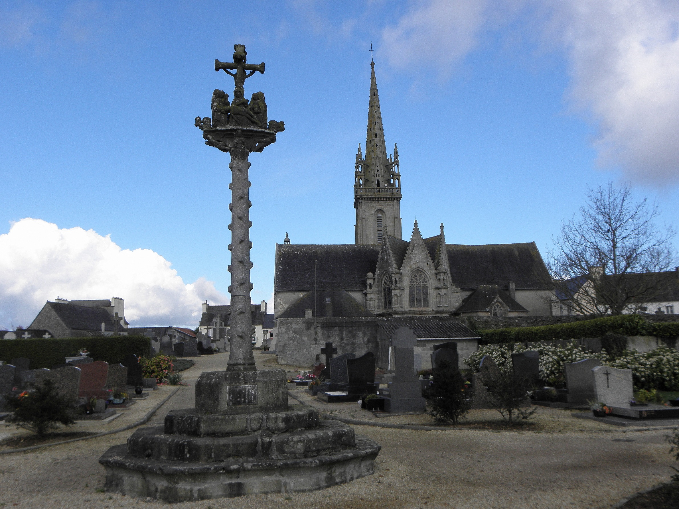 Calvaire du cimetière et chevet de l'église Saint-Pierre de Guiclan (29).